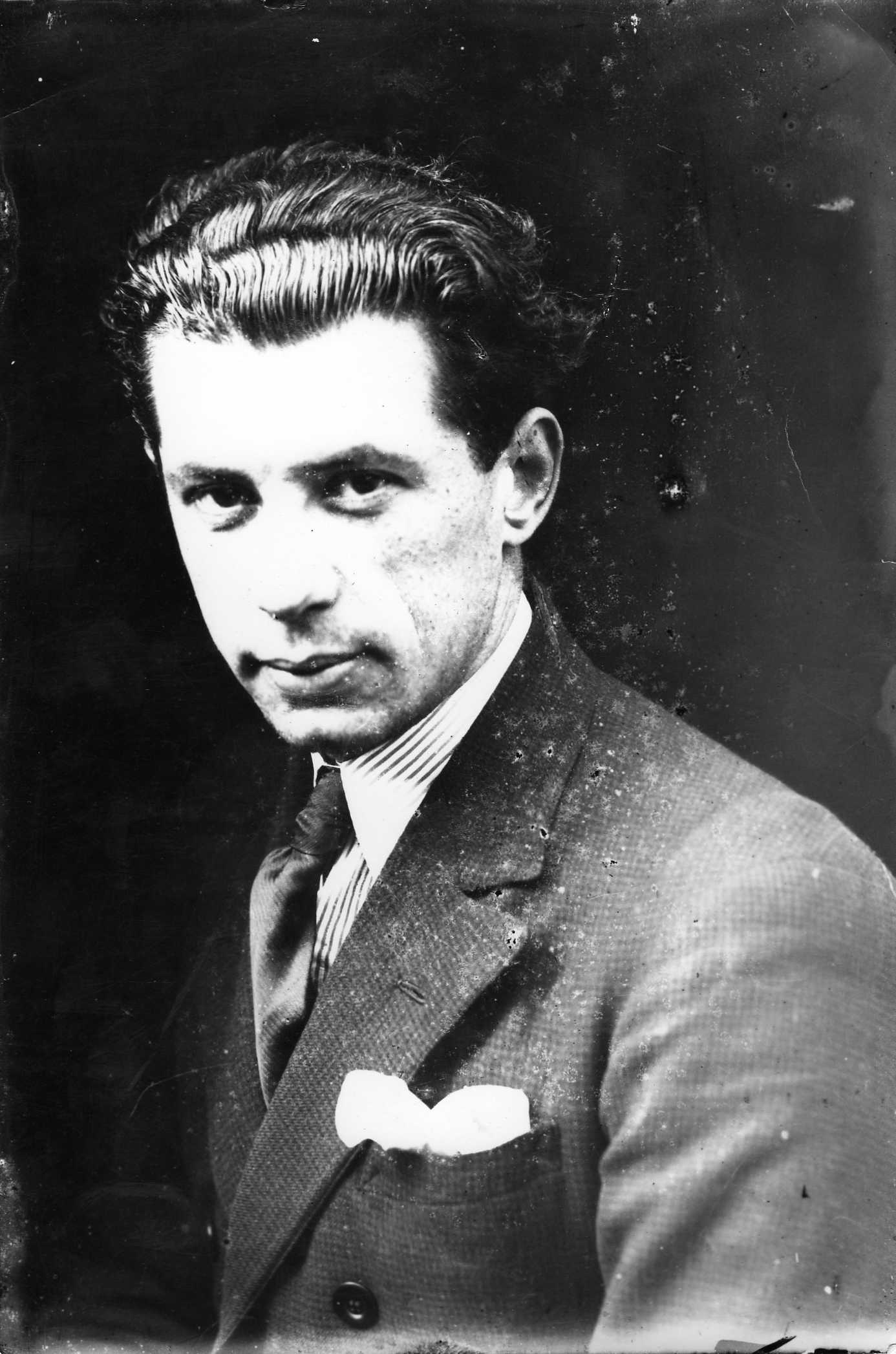 Fotografía de Antonio Radonich Scarpa